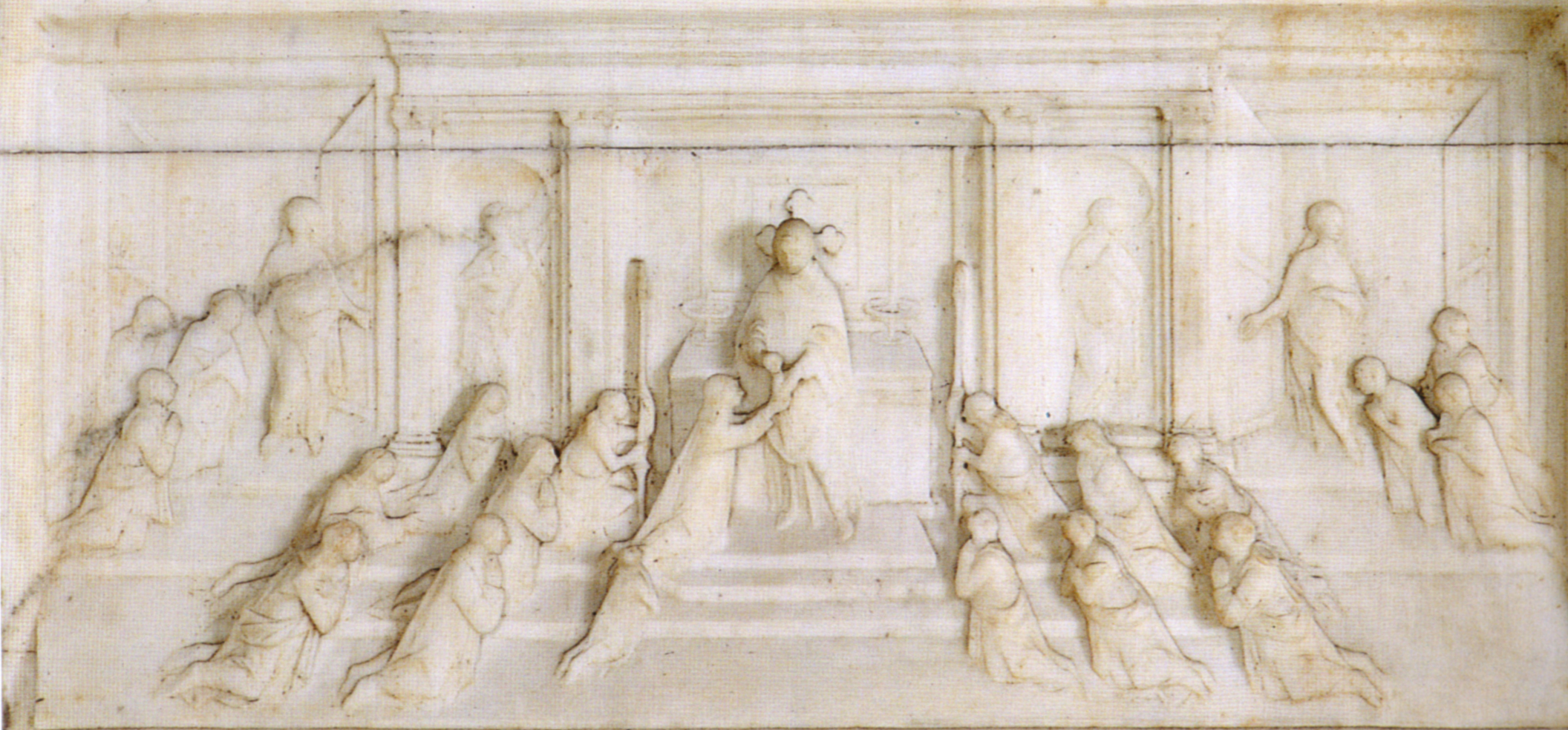 Cappella del miracolo, mino da fiesole, affidamento del calice miracoloso alle monache